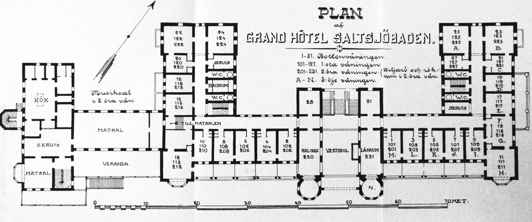 Grand Hotel planritning, arkitekt Erik Josephson